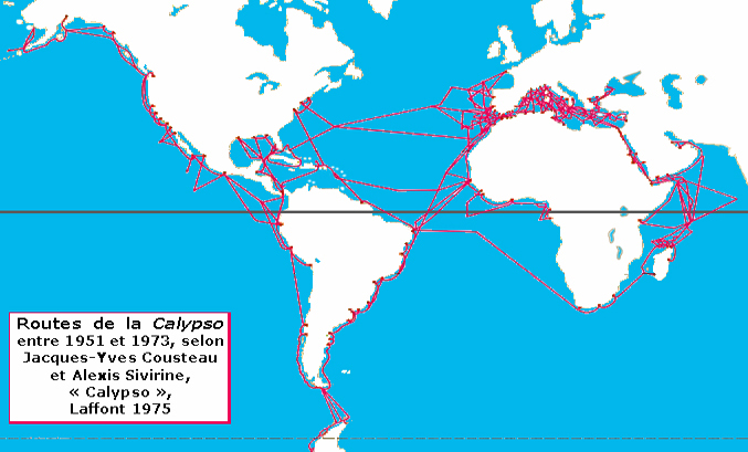 Routes de la Calypso de l'Equipe Cousteau entre 1951 et 1973